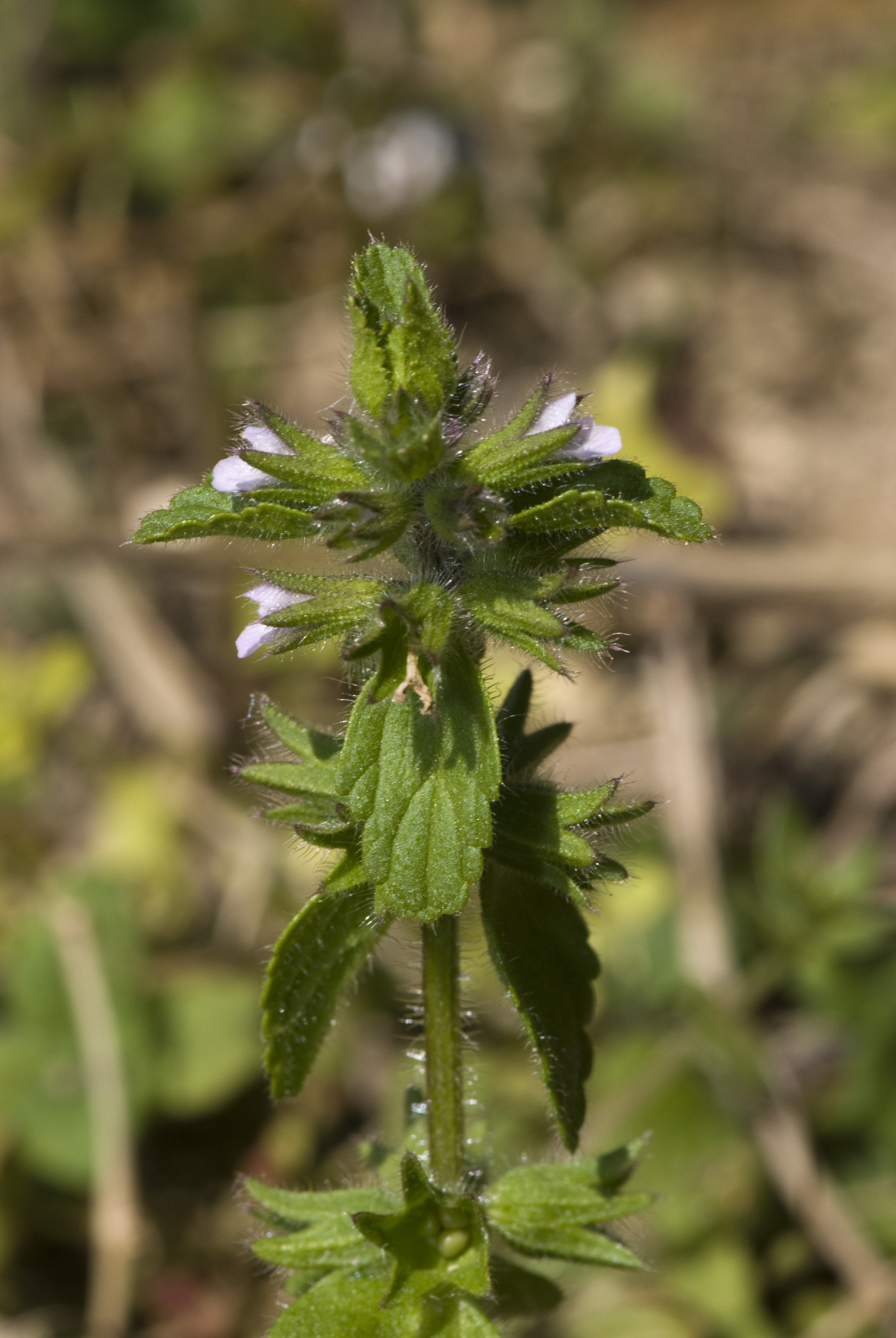 Stachys arvensis Vallée de Grâce à Amiens (Somme), France